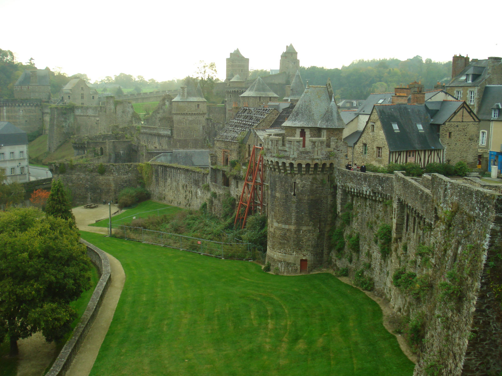 Fougères - Novembre 2011